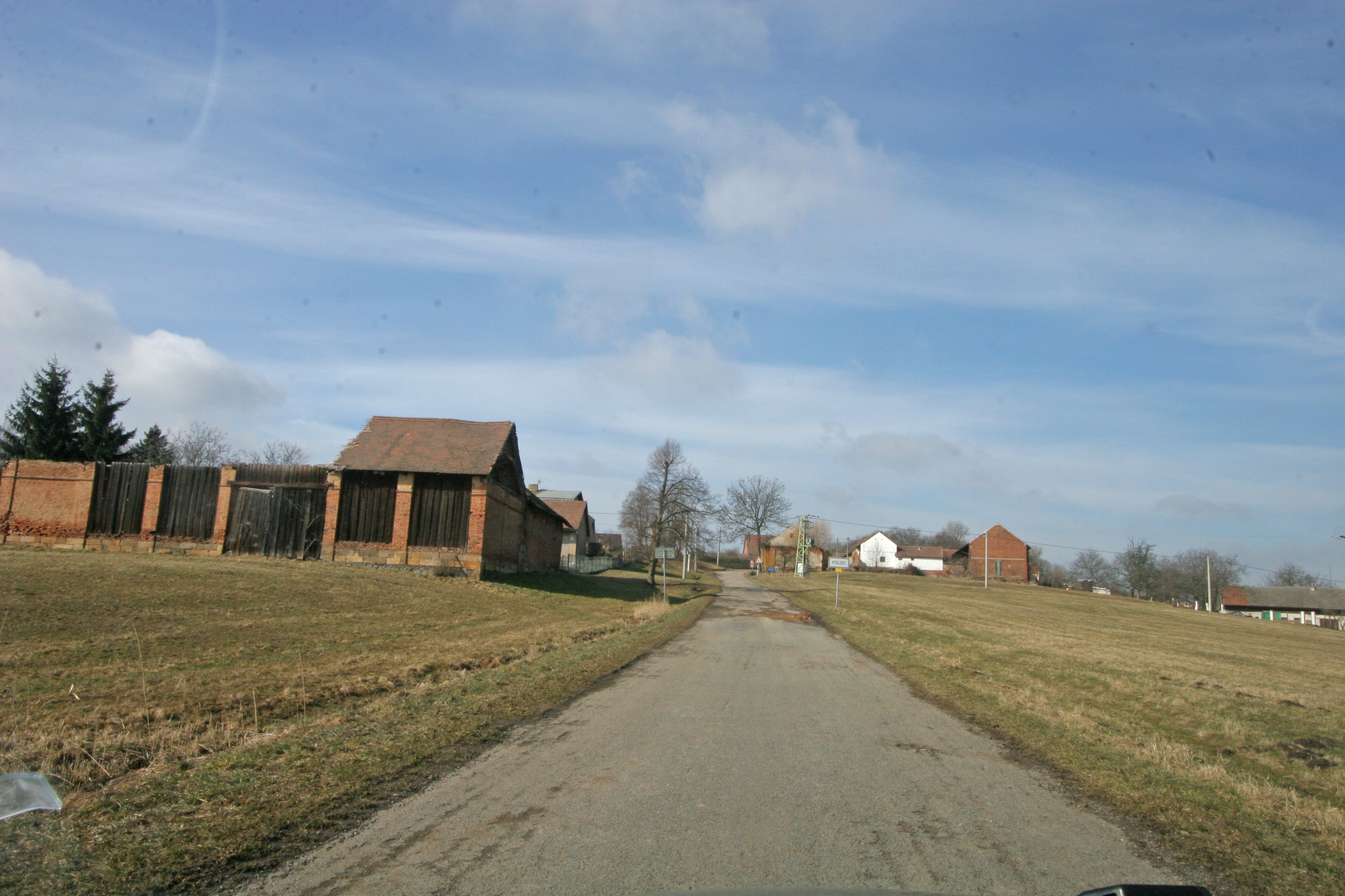 Polizy příjezd od Žižkovce